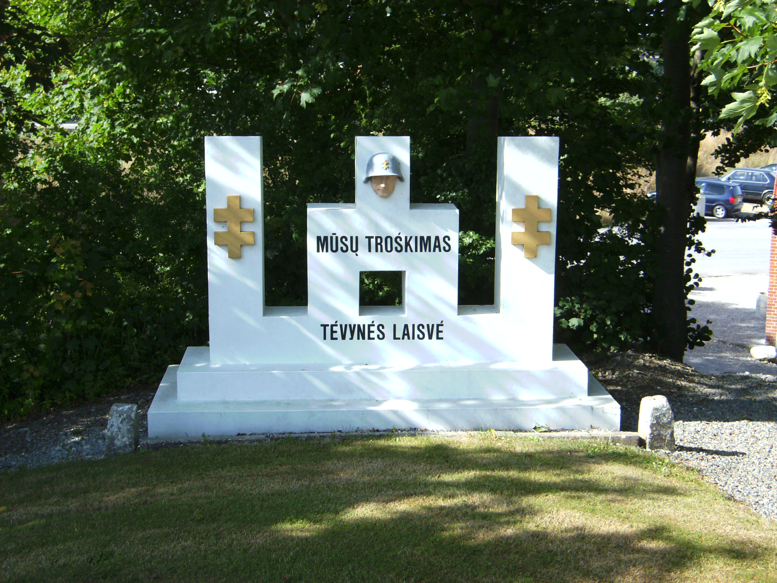 Dragsbæklejren lå syd for Thisted og blev bygget under 2. Verdenskrig som tysk vandflyverstation Former station for hydroplanes during the german occupation of denmark in World War 2 Mindesmærke for Dragsbæklejrens tid som flygtningelejr Memorial made by refugees after World War 2